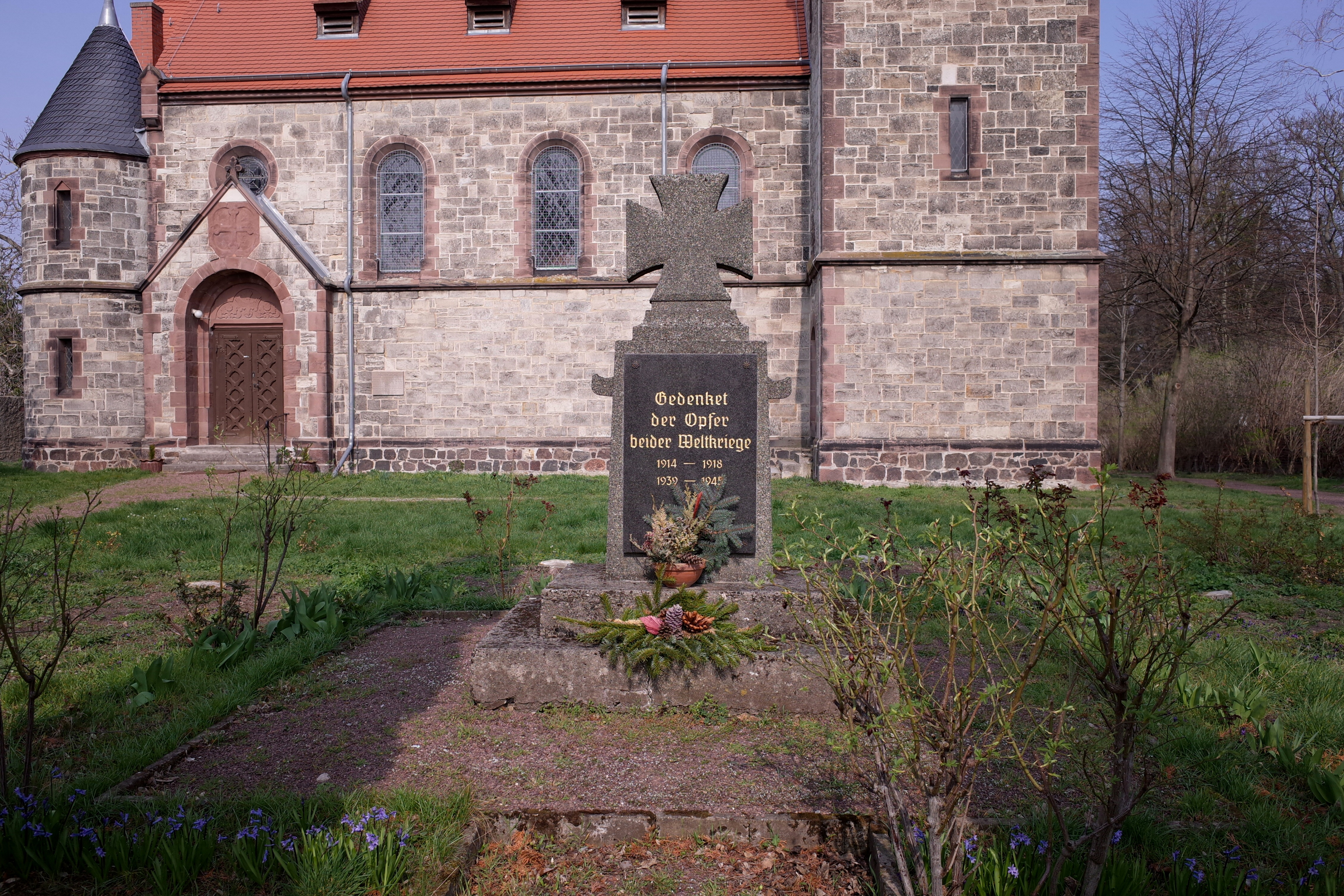 Köthen (Anhalt), Gedenkstein für die Opfer der Weltkriege an der Dorfkirche im Ortsteil Merzien.